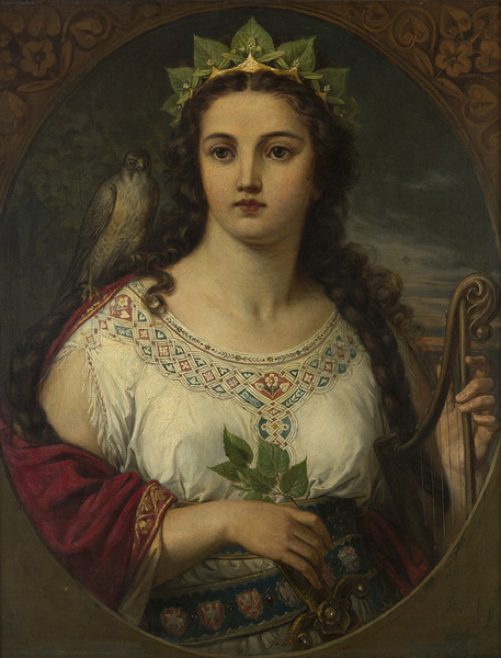 Petr Maixner - Slávie